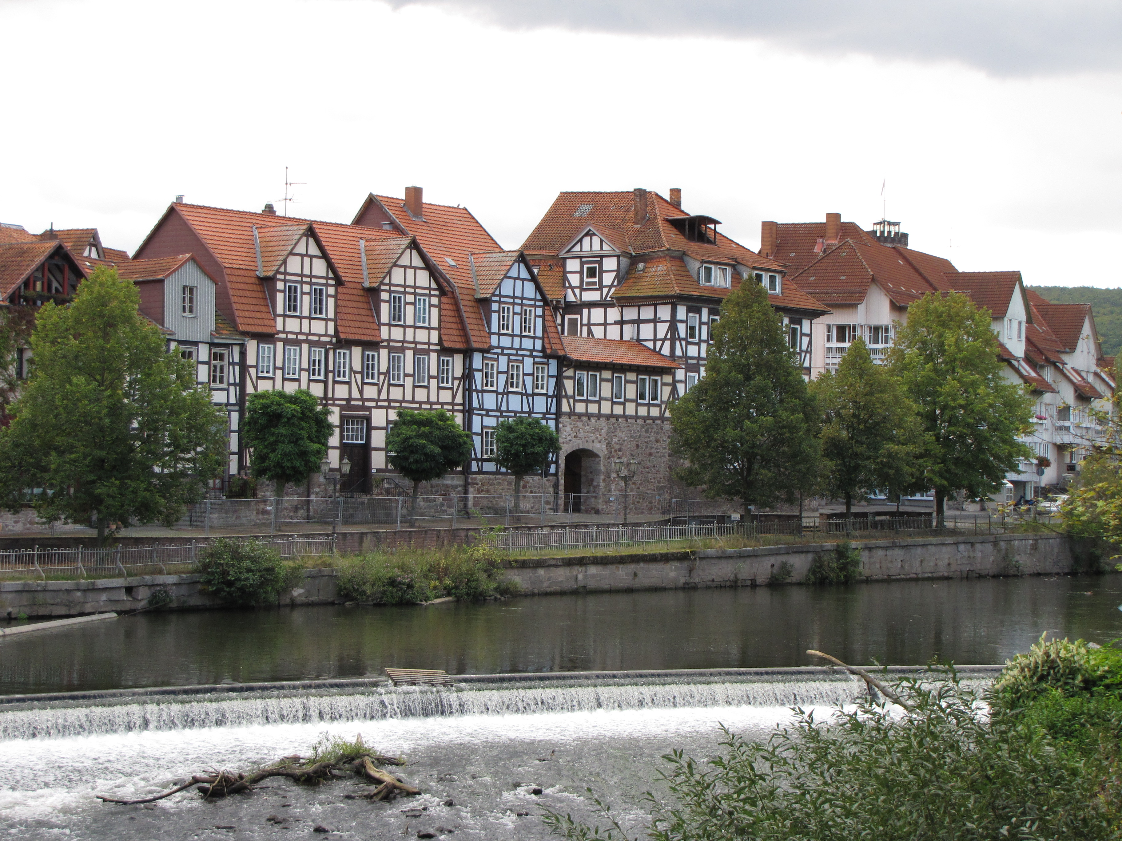 Floden Werra rinner bland annat genom staden Hannoversch Münden.